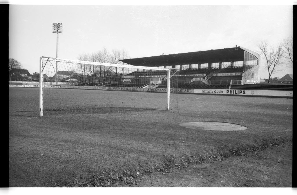 Holsteinstadion am Westring 501